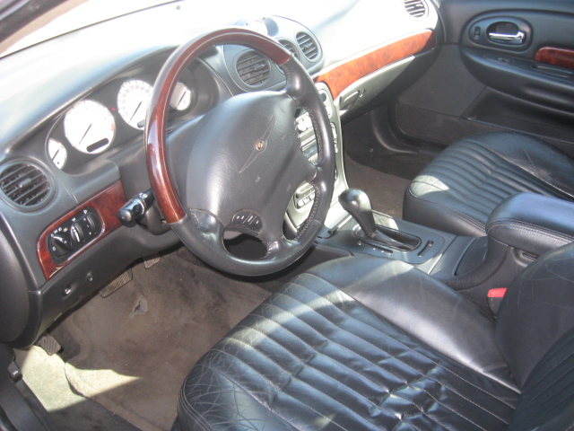 Салон Chrysler 300M